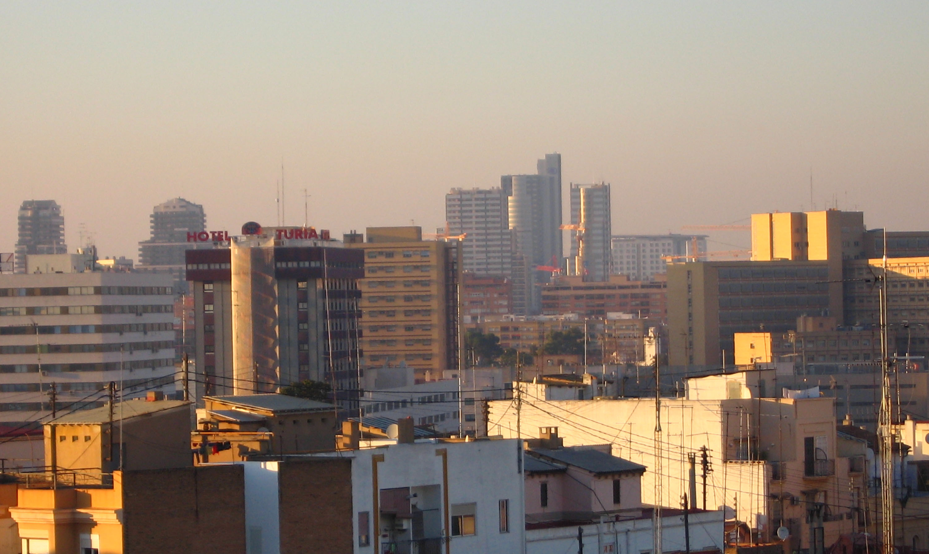 Vista de València XXI. Es una fotografia presa des del sud del Túria mirant cap al nord. Es poden veure parts dels districtes de Campanar i Benicalap fins a l'Hotel Hilton.